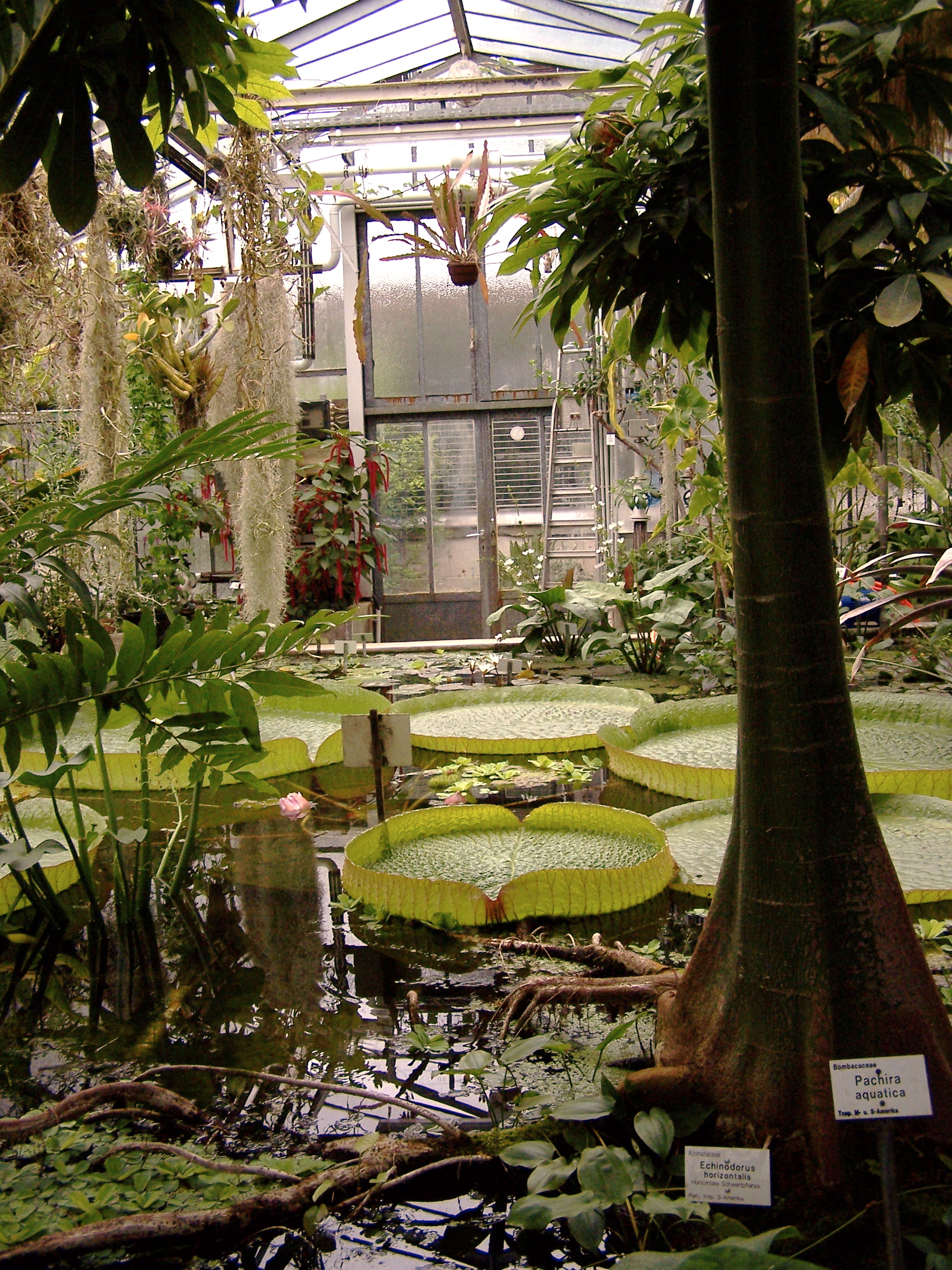 Victoriahaus im Alten Botanischen Garten der Universität Göttingen (wurde 2015 abgerissen)